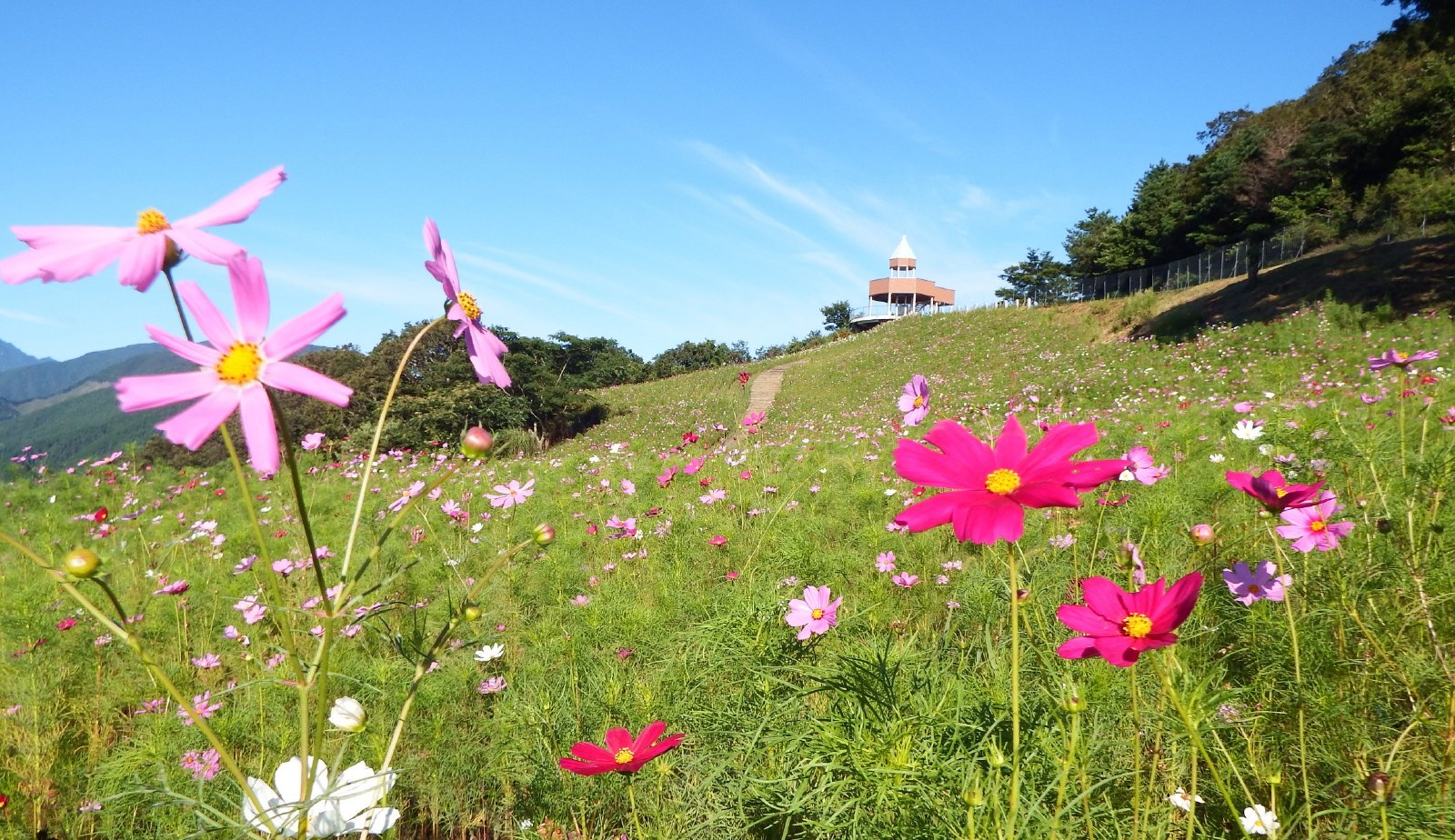 翠波高原の秋